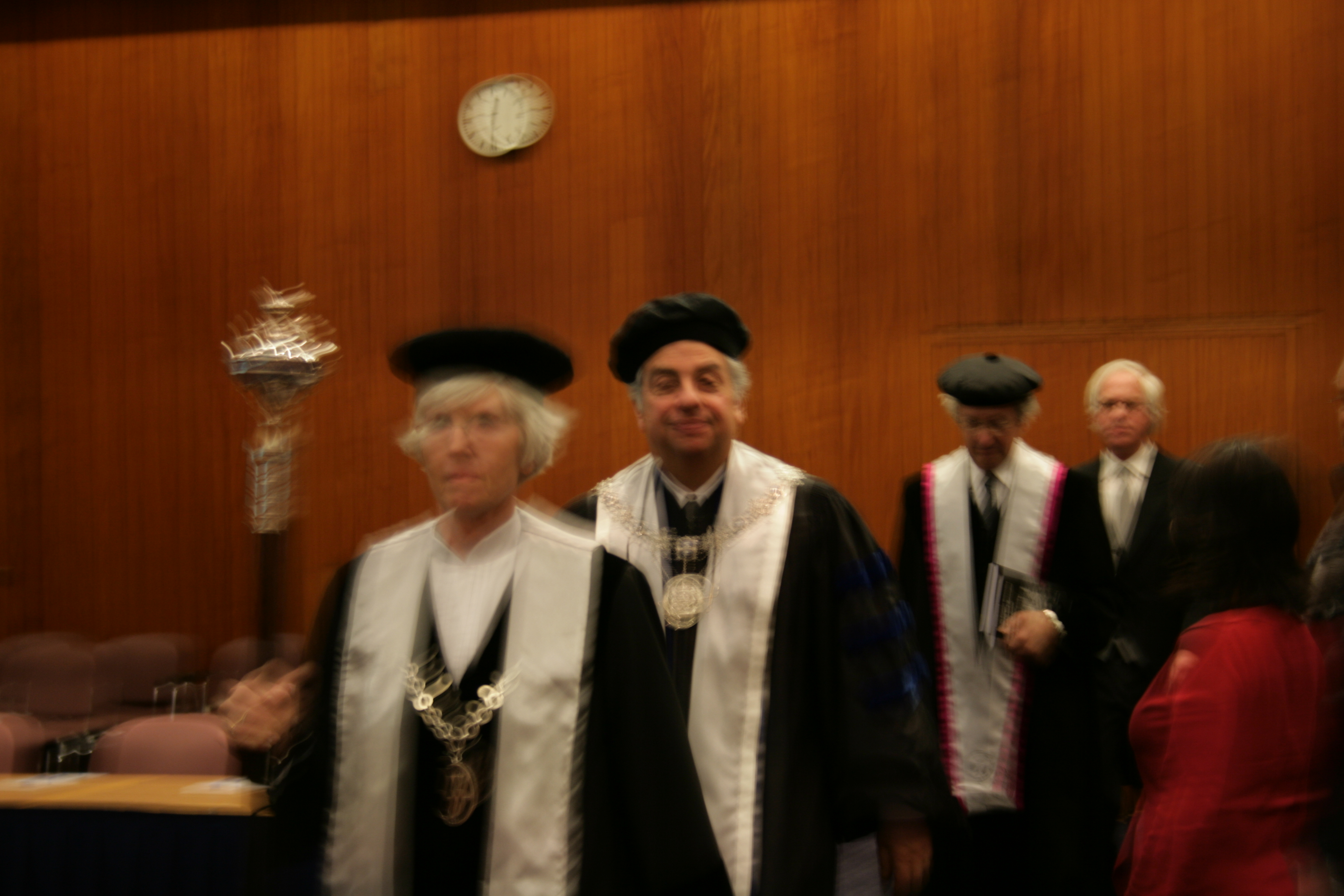 Wetenschappelijke promotie